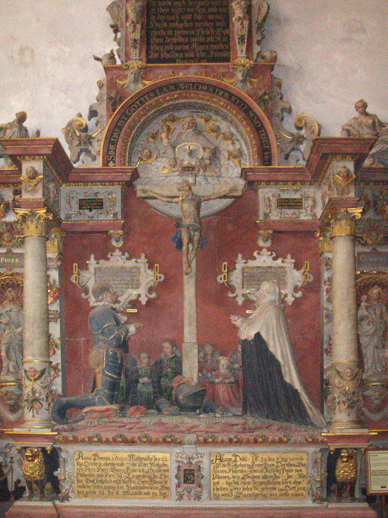 Hohenlohe-Grabmal im Hochchor der Stiftskirche in Öhringen